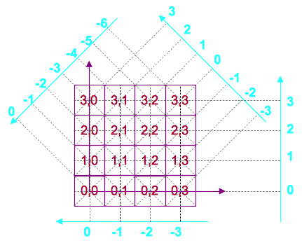 Figure 2 pour la définition de la transformée Mojette